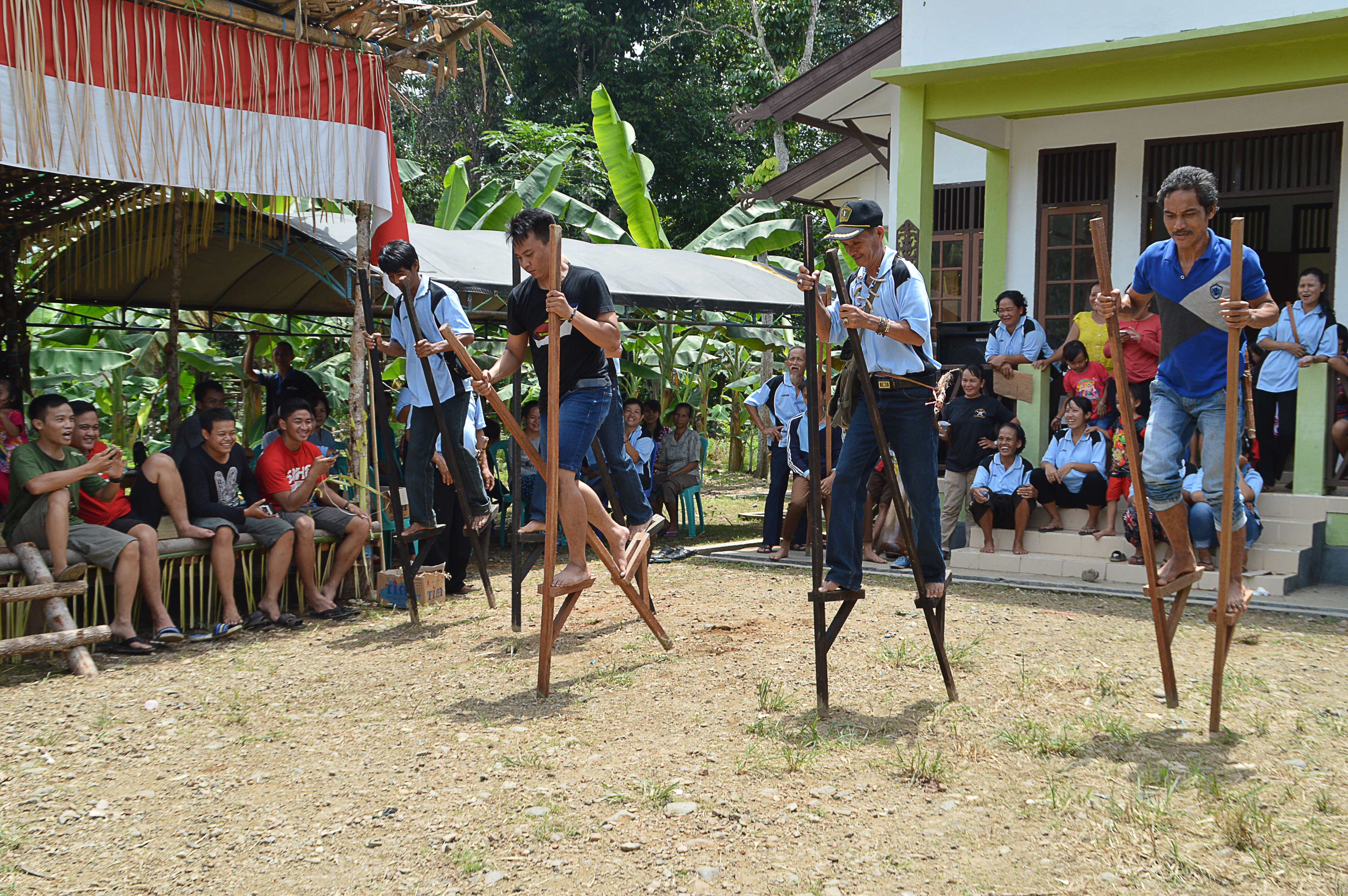 Kenje, permainan tradisional dari etnis Dayak Deah, Kabupaten Tabalong, Kalimantan Selatan.